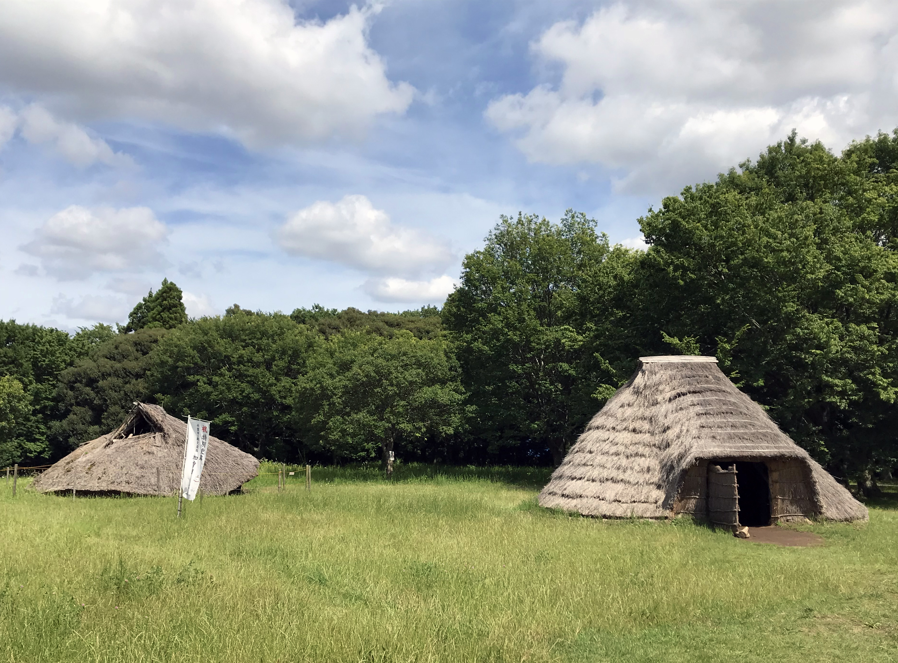 復元縄文住居